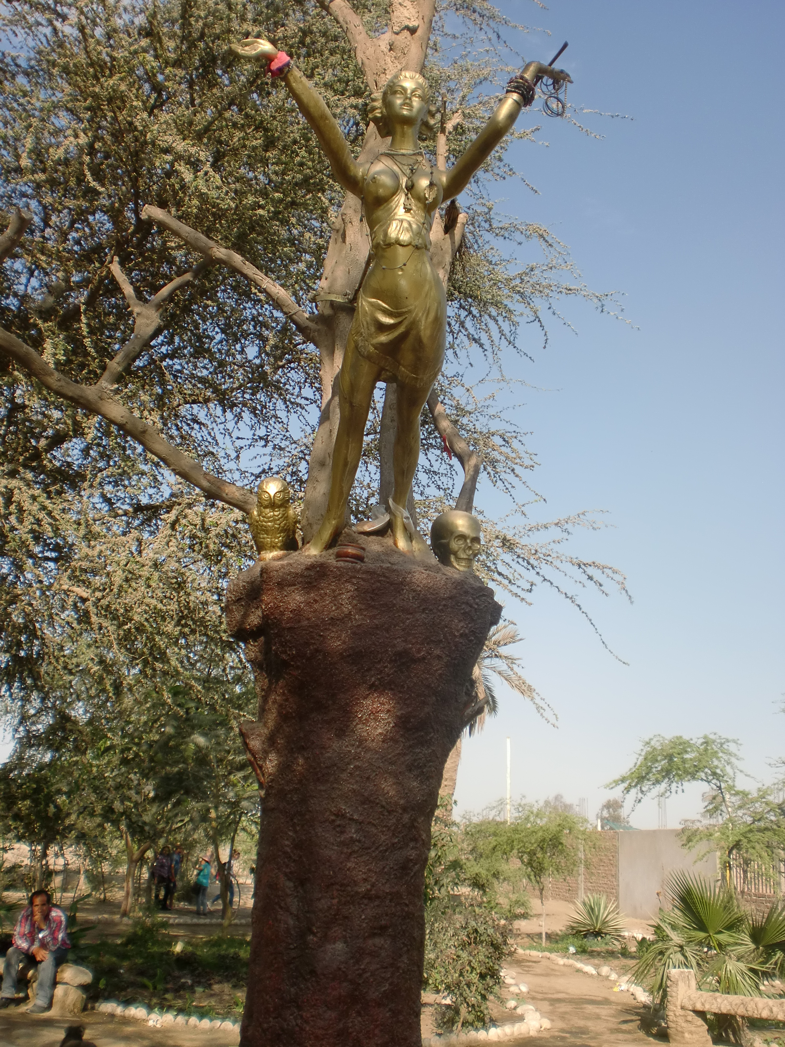 ESTATUA DE LA BRUJA DE CACHICHE